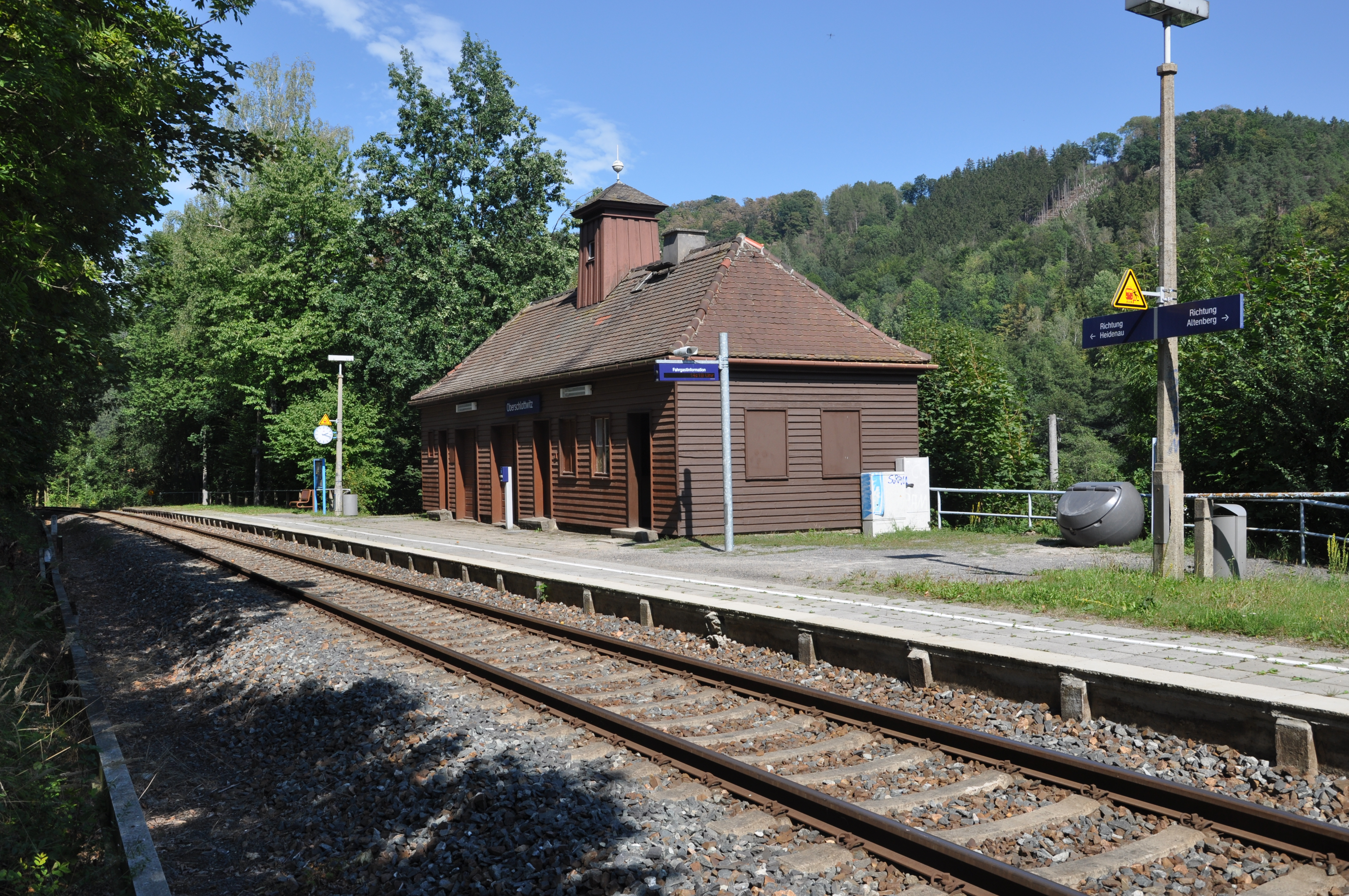 Haltepunkt Oberschlottwitz, Müglitztalbahn